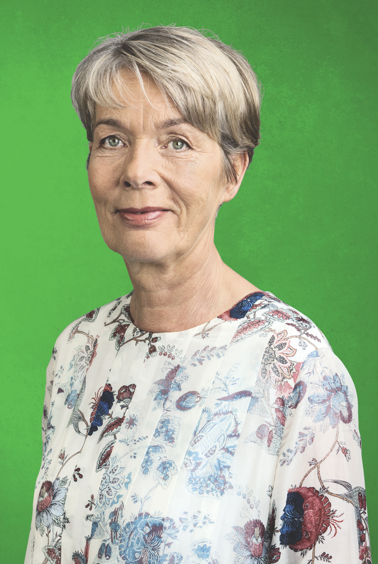 ´Charlotte Schneidewind-Hartnagel 2017